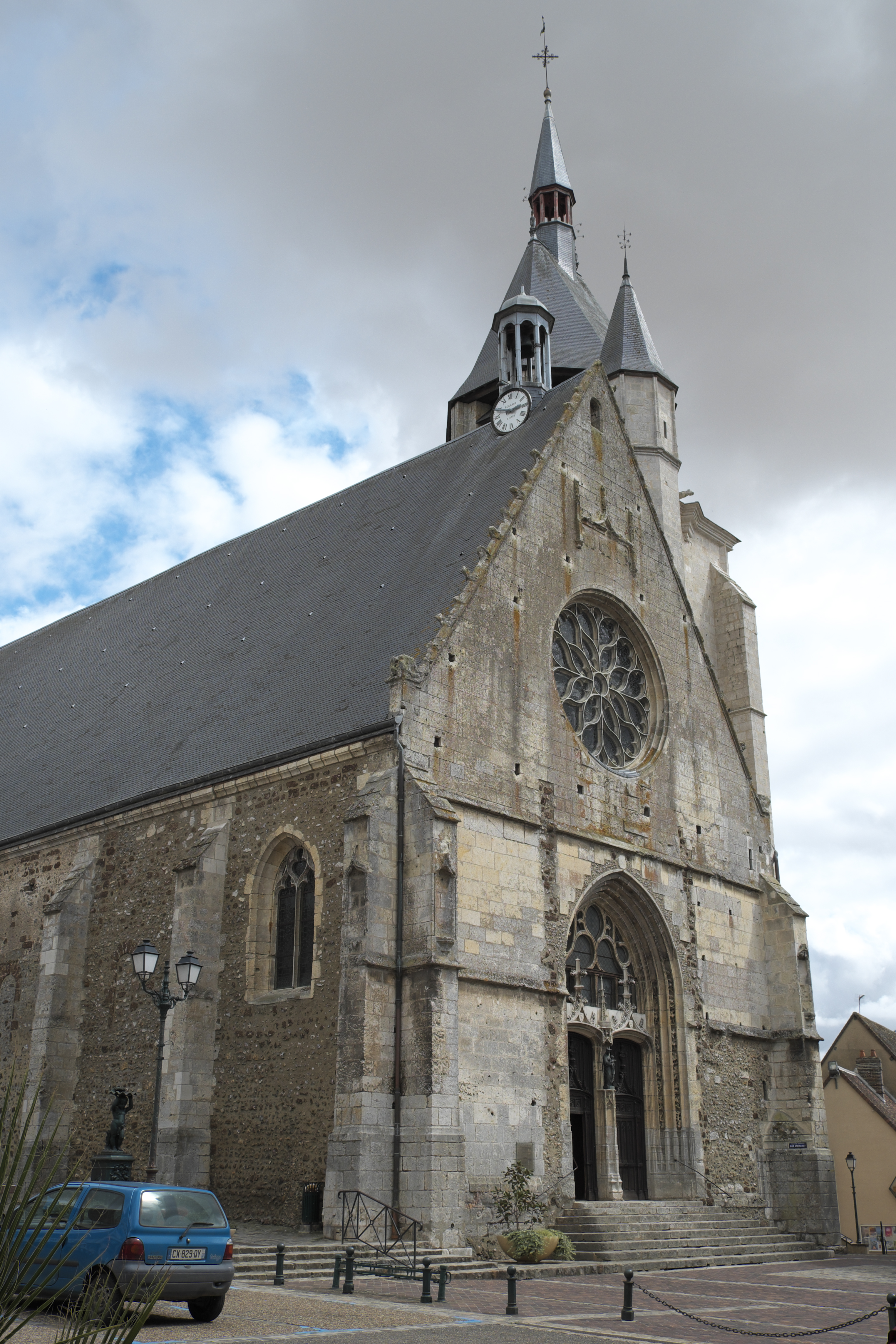 Katholische Kirche Saint-Jacques in Illiers-Combray im Département Eure-et-Loir (Centre-Val de Loire/Frankreich) .